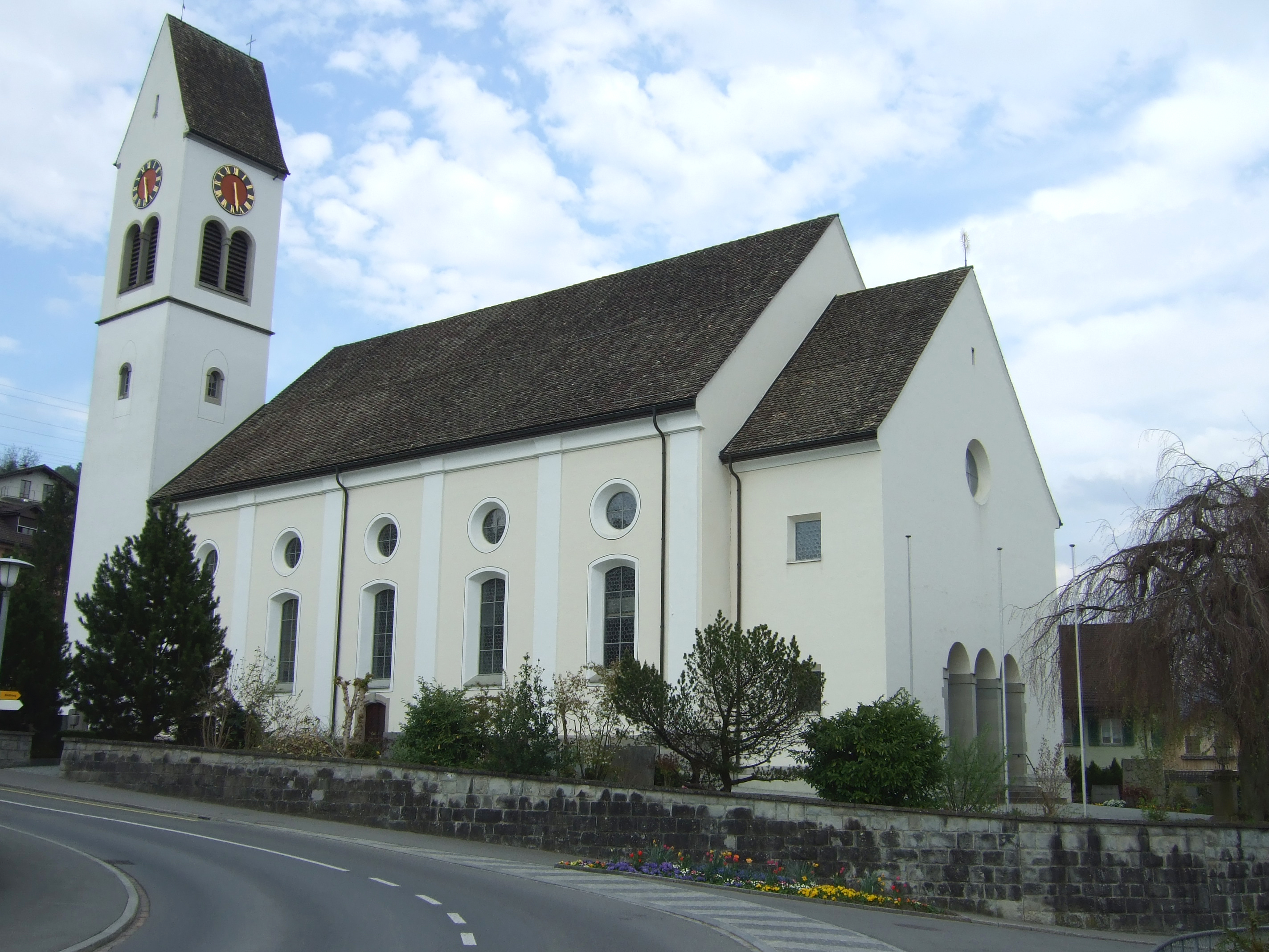 Die katholische Pfarrkirche St. Jodokus, Schmerikon, 2009